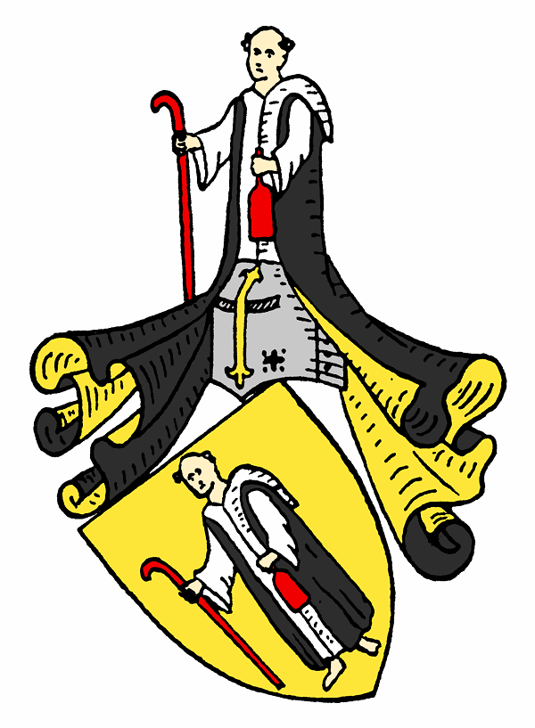 Герб рода Мюнхгаузенов ("белых")